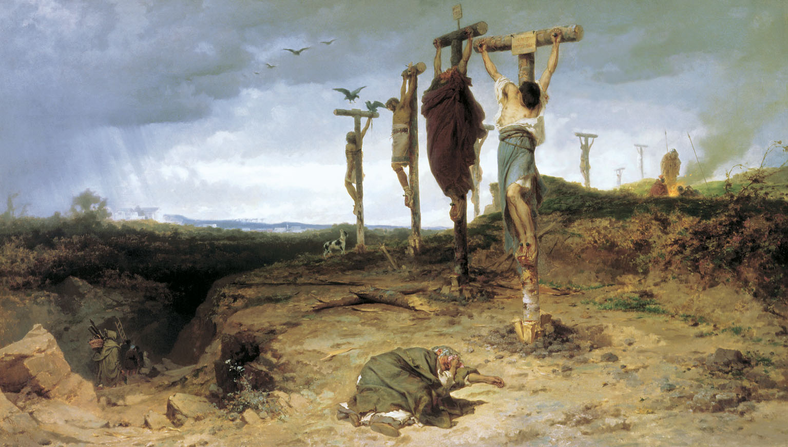 Федор Андреевич Бронников (1827-1902). Проклятое поле. Место казни в Древнем Риме. Распятые рабы. 1878 год. Холст, масло. Третьяковская галерея, Москва.Fedor Andreevich Bronnikov (1827-1902). The damned box. Place of execution in ancient Rome. The crucified slaves. the year 1878. Oil on canvas. Tretyakov Gallery, Moscow.